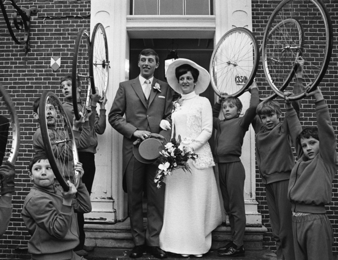 Marriage of Piet de Wit